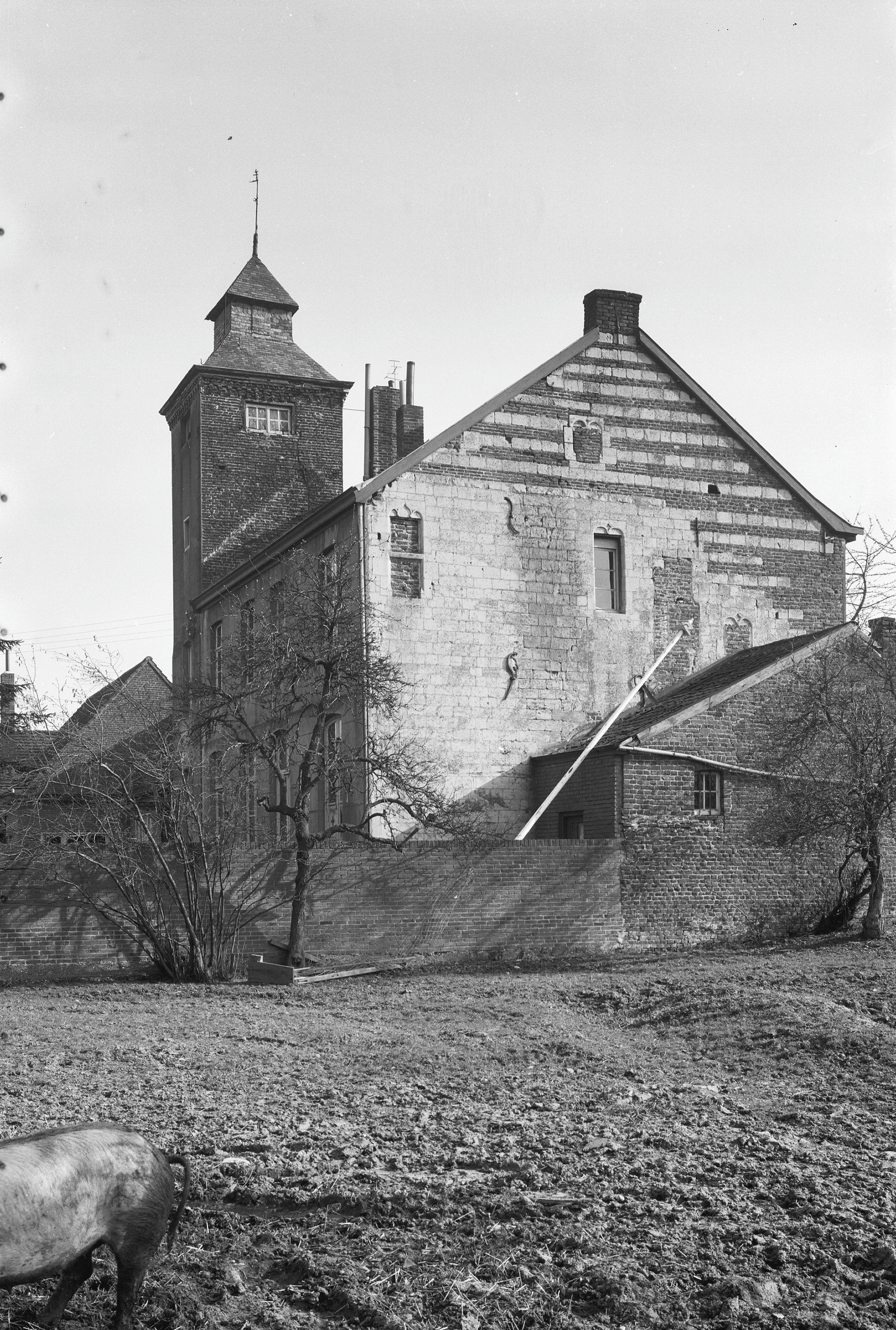 aanzicht